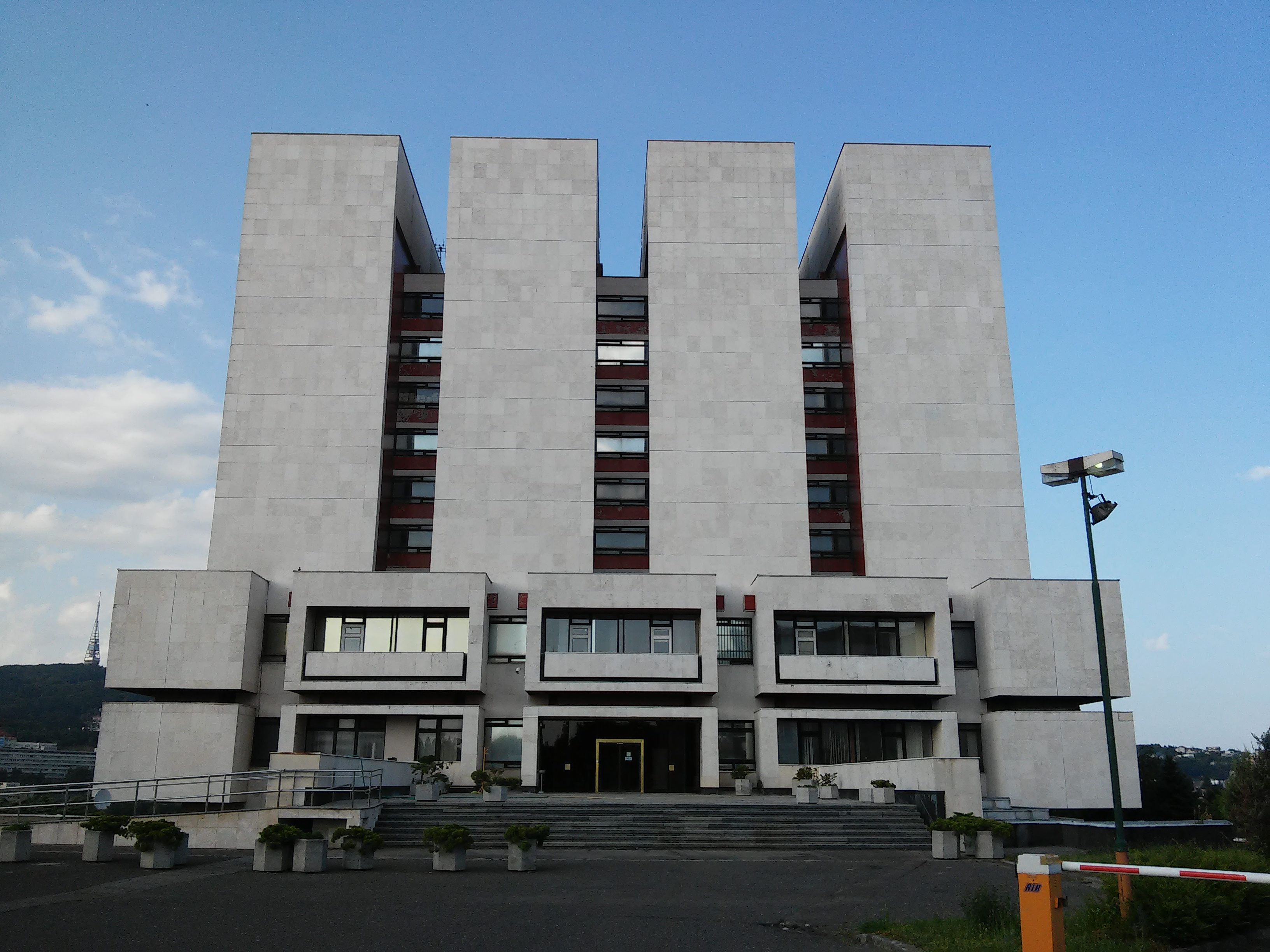 Slovenský národný archív, Drotárska cesta 42, Staré Mesto, Bratislava